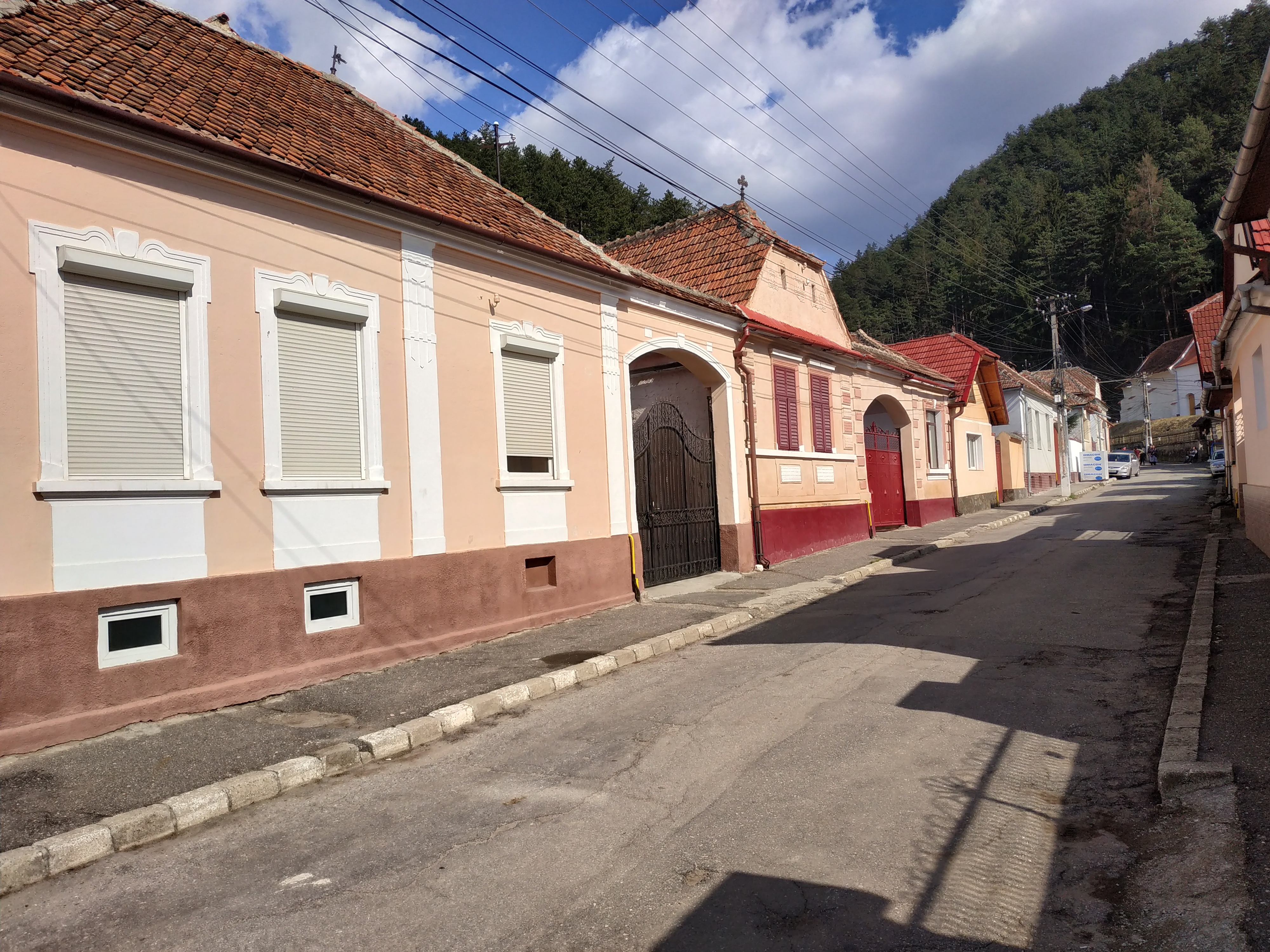 Str. Romulus Cristoloveanu, Râșnov, România